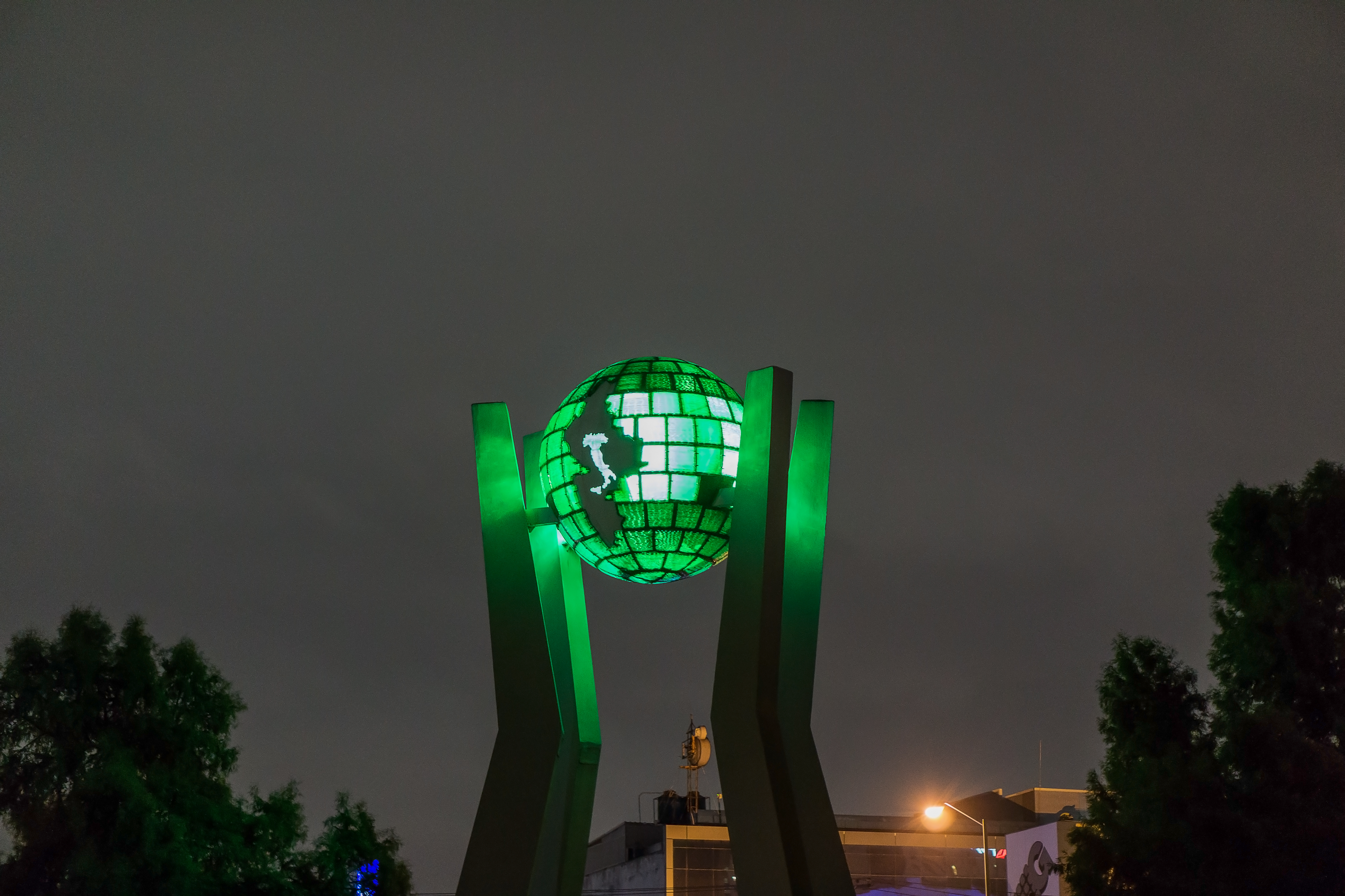 Plaza italiana en San Pedro Garza Garcia.